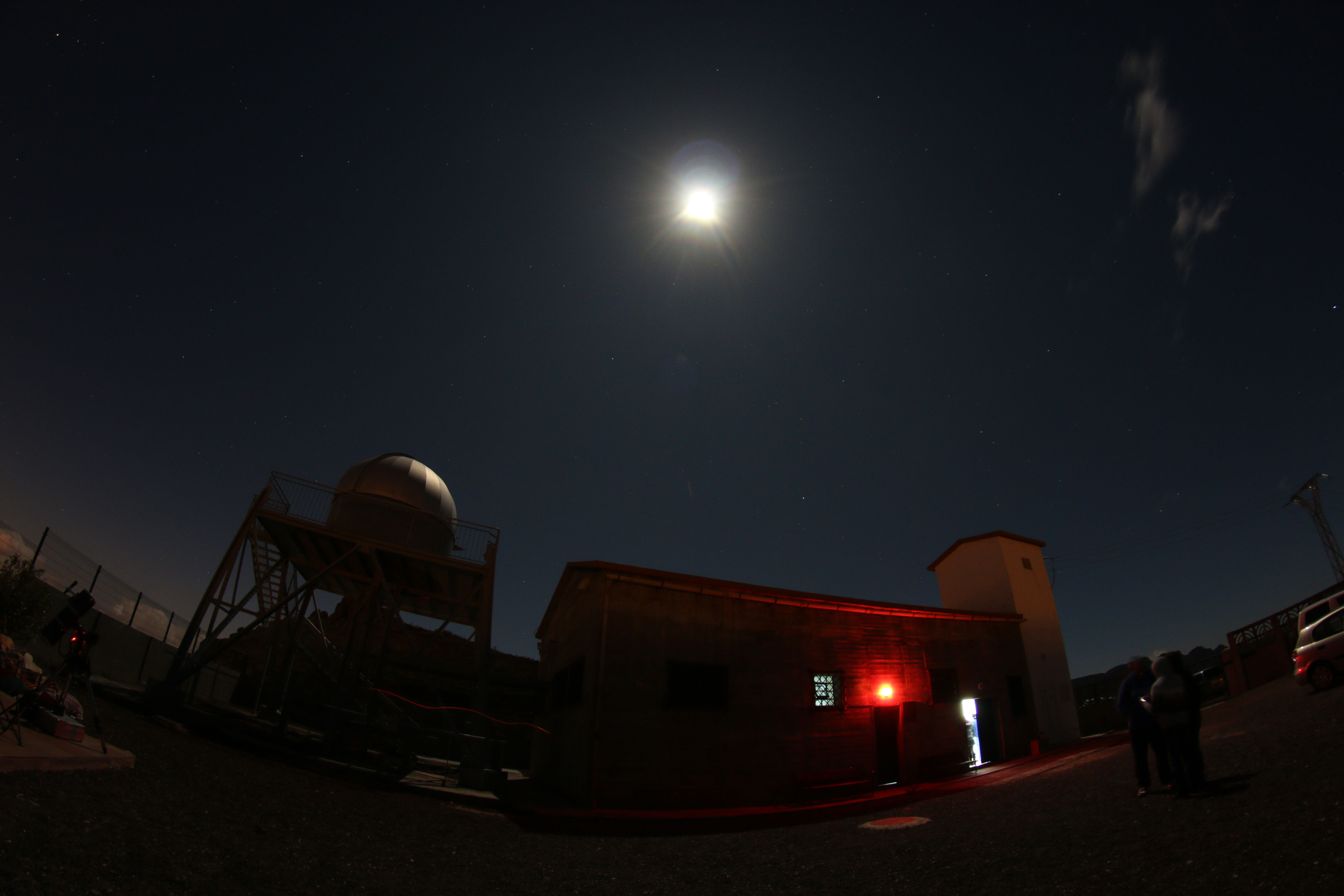 Eclipse Superluna (Luna de Sangre) desde el Observatorio Astronómico de Temisas Agüimes Gran Canaria 28 - septiembre 2015.